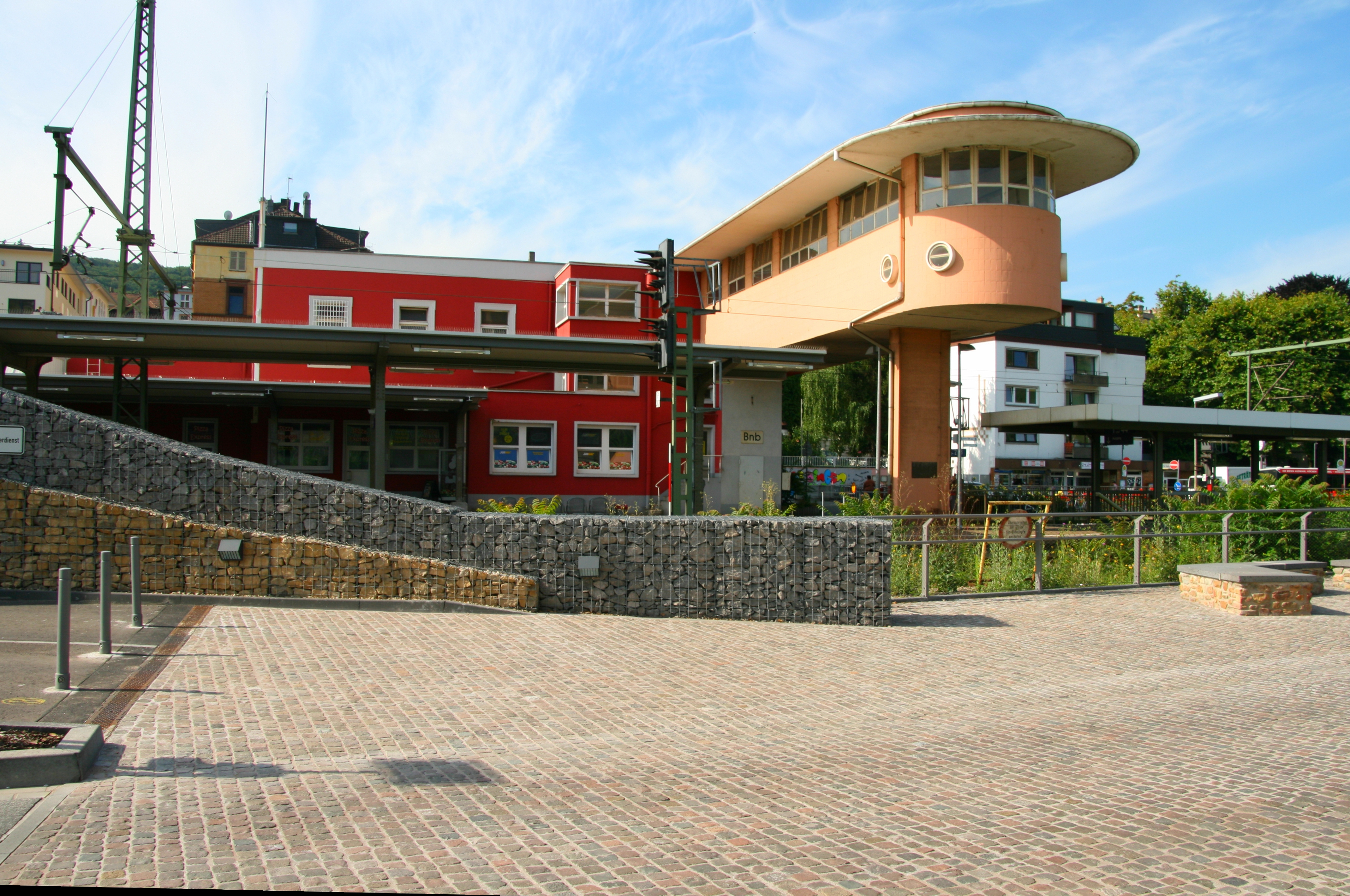 Bahnhof Bingen-Stadt: Empfangsgebäude, Anbau mit Reiterstellwerk Bnb (1937). Bingen am Rhein.